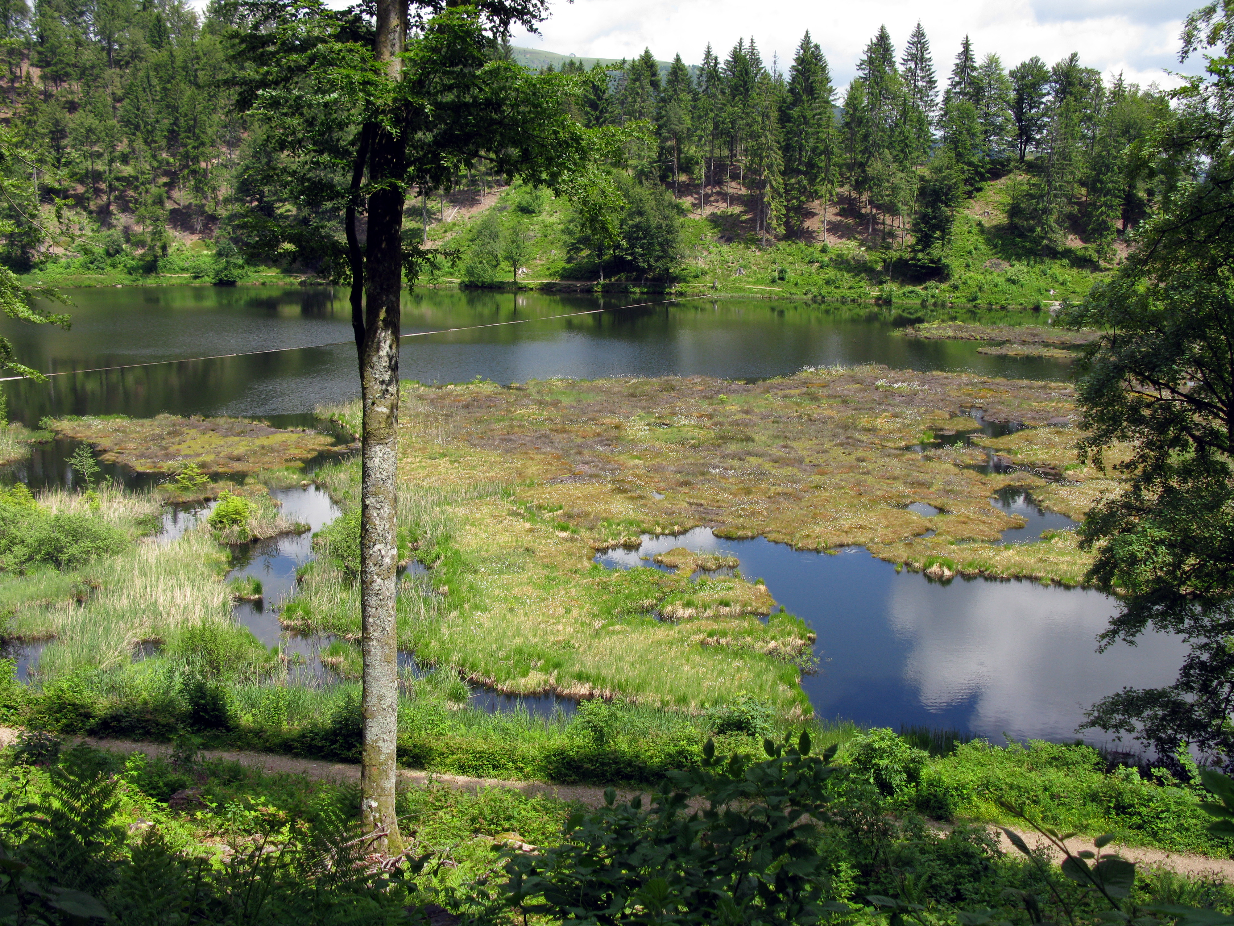 Nonnenmattweiher in Neuenweg-Heubronn mit schwimmender Torfinsel